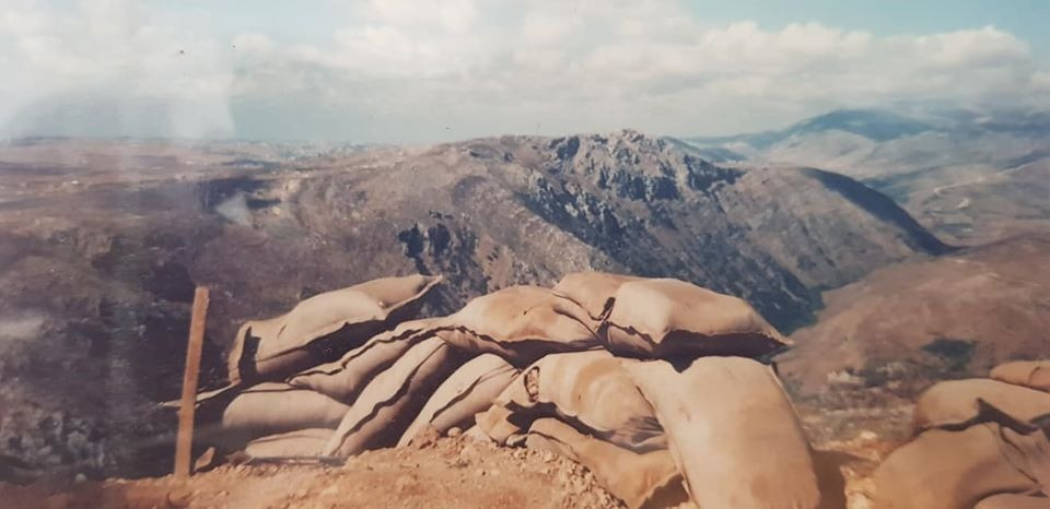 צילום של הבופור ממוצב גלגלית